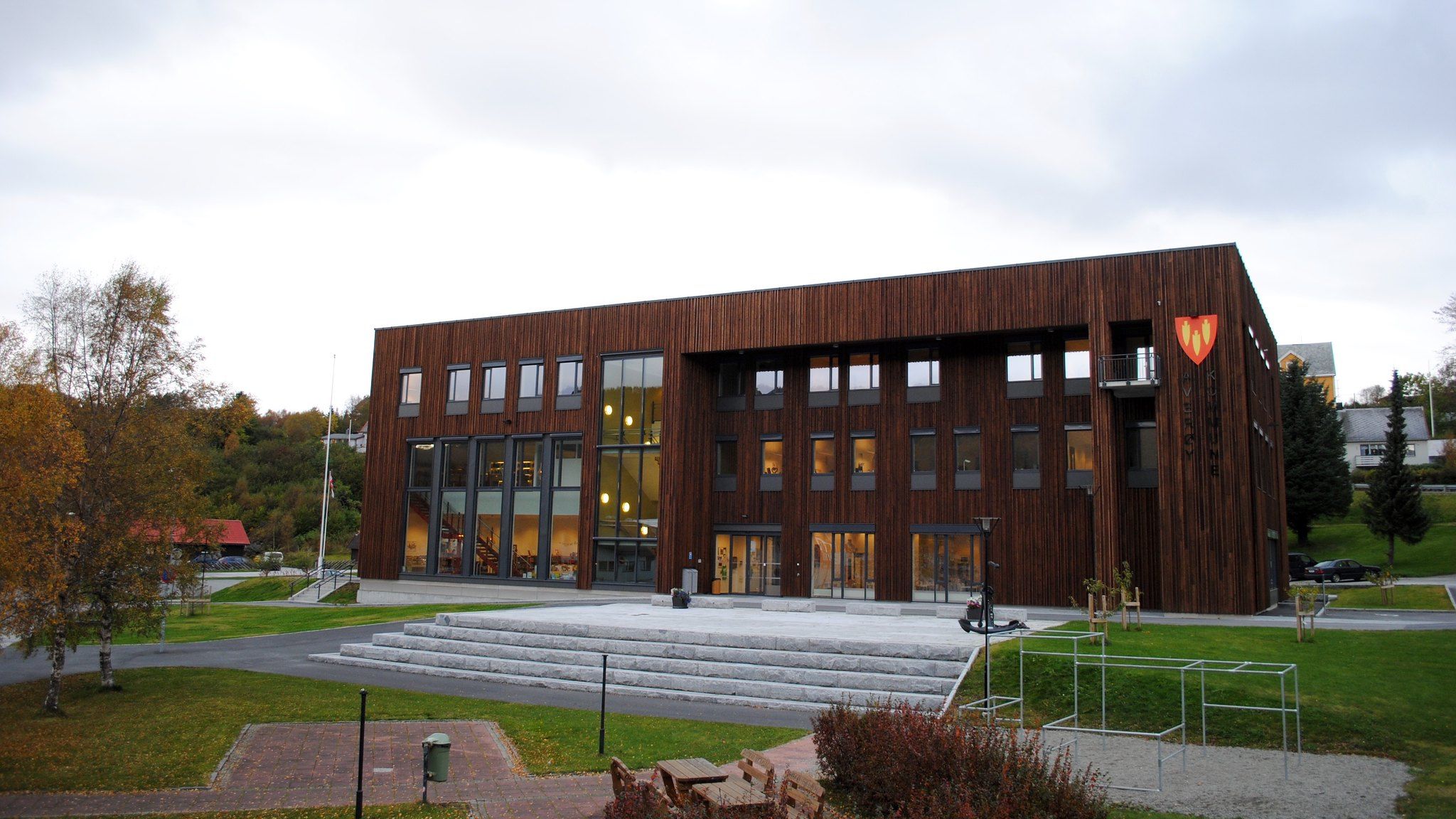 Averøy kommunehus